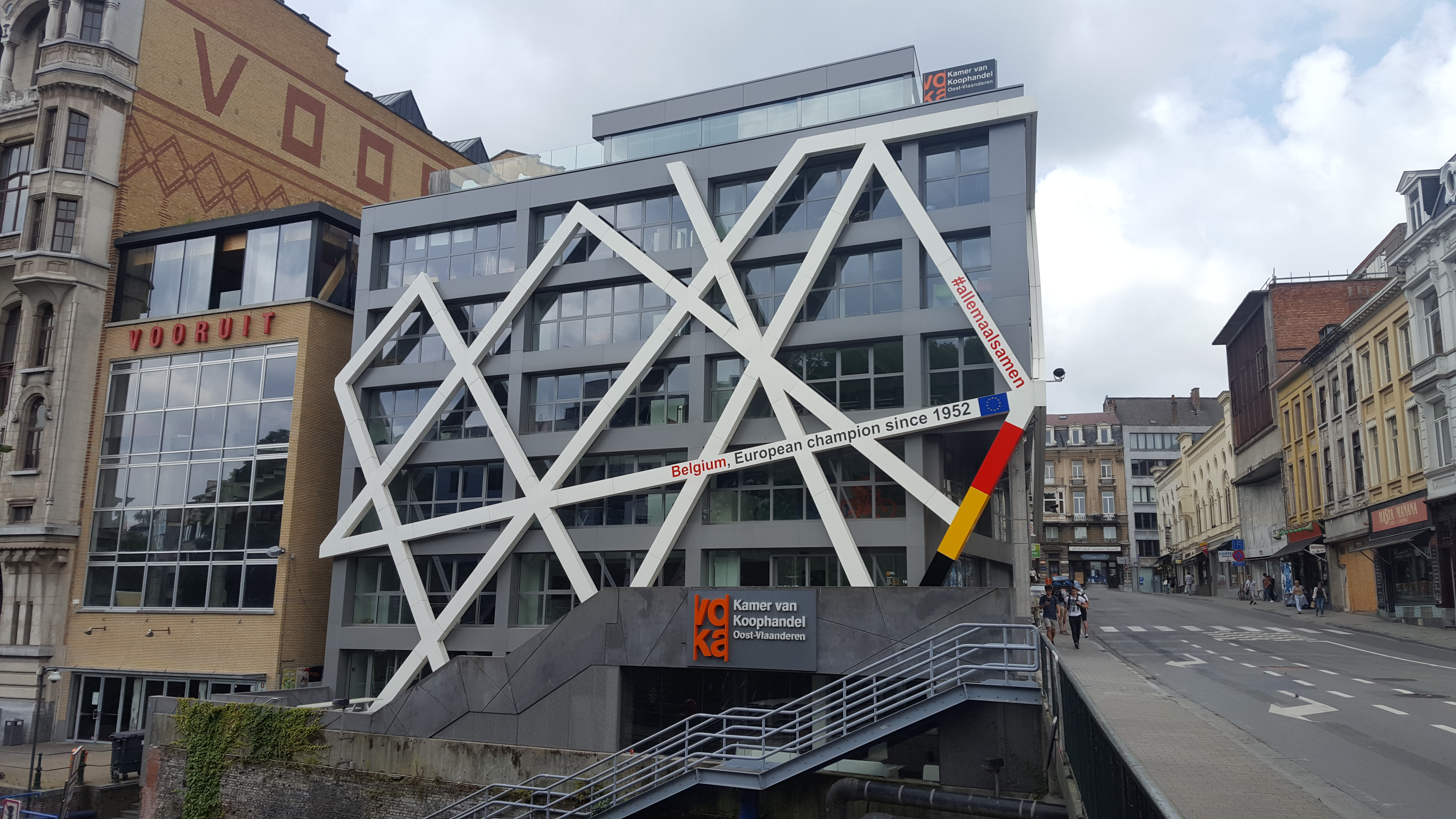 Kamer van Koophandel, Lammerstraat, Gent, België